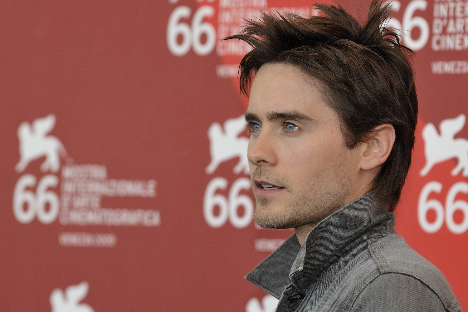 66ème Festival du Cinéma de Venise (Mostra), 10ème jour (11/09/2009) Photocall avec Jared Leto, Diane Kruger, Sarah Polley et le réalisateur Jaco Van Dormel pour le film : MR. NOBODY